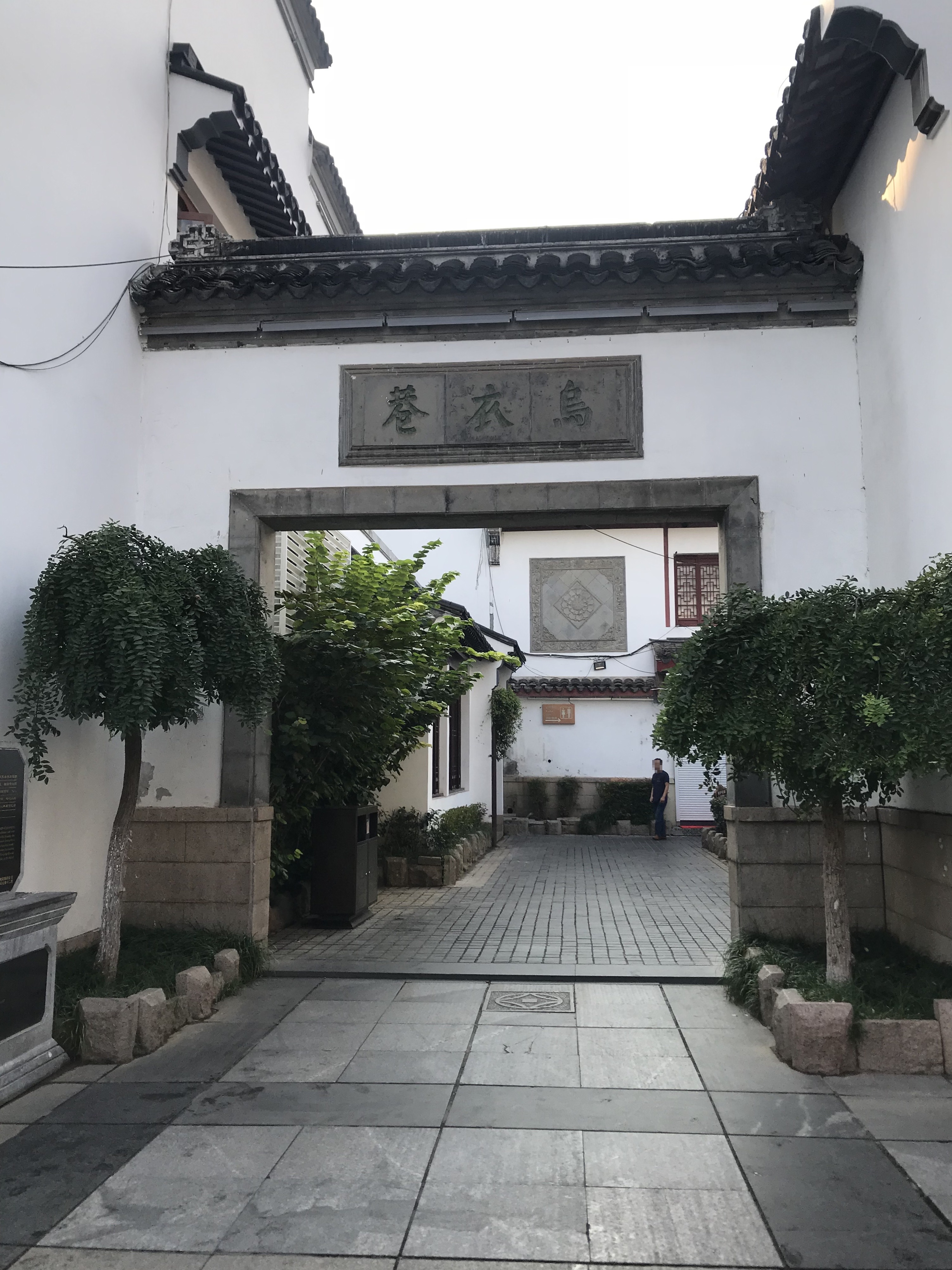 夫子廟・烏衣巷